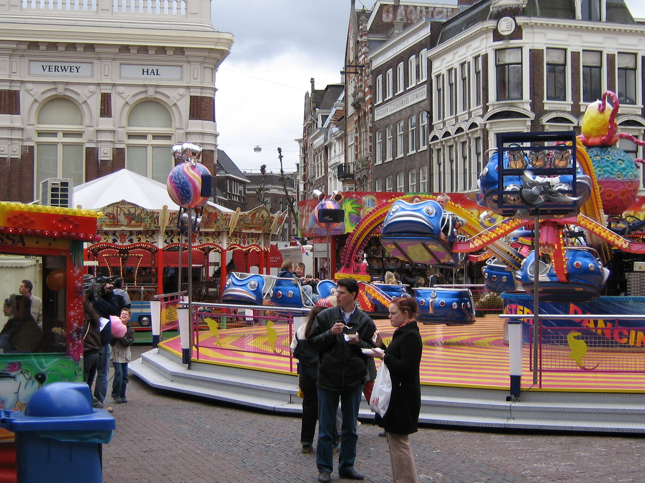 Kermis in Haarlem, eind april 2006 Fun fair in Haarlem, late april 2006